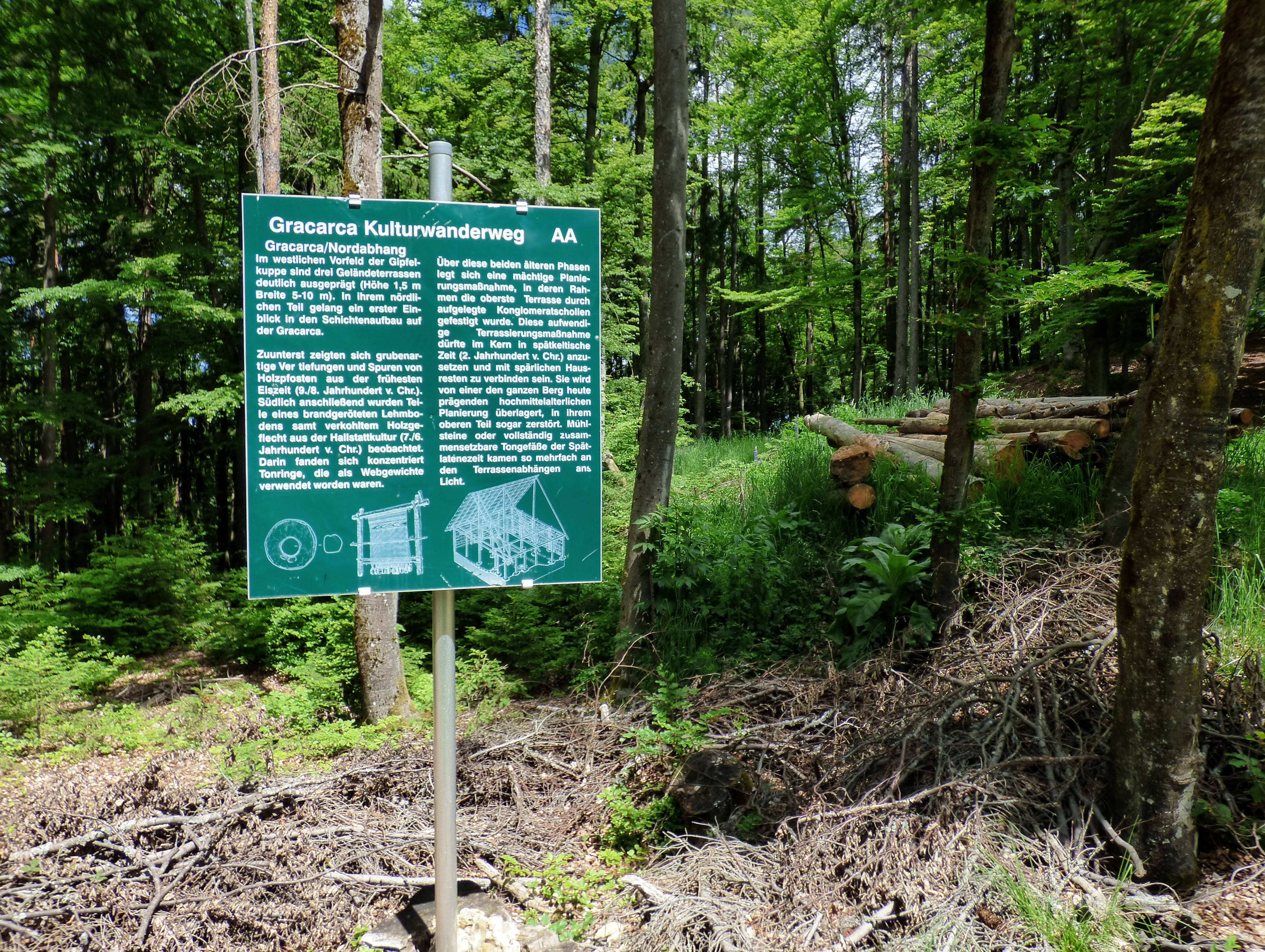 Höhensiedlung Gracarca, St. Kanzian am Klopeinersee